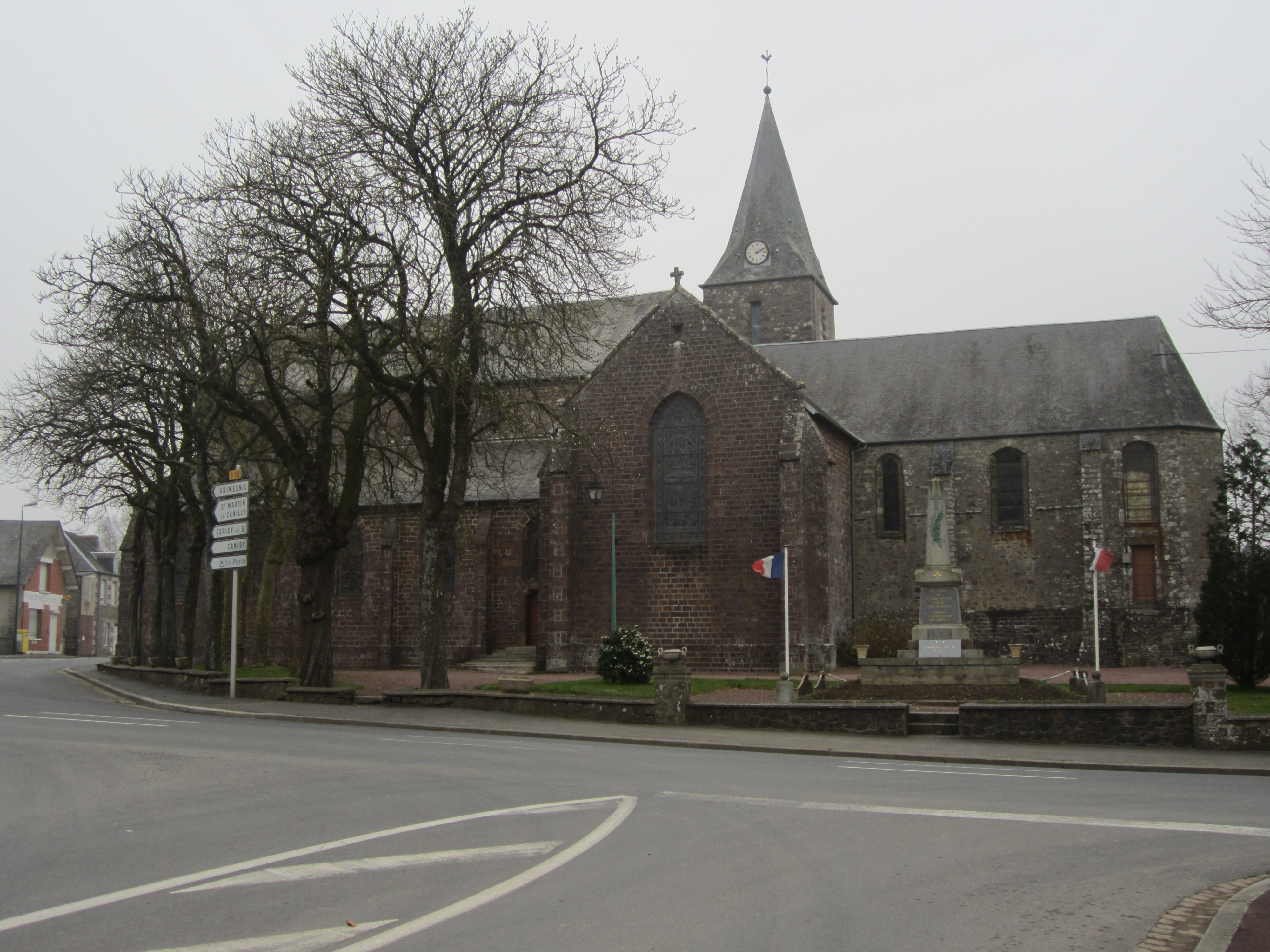 église de Saint-Denis-le-Gast